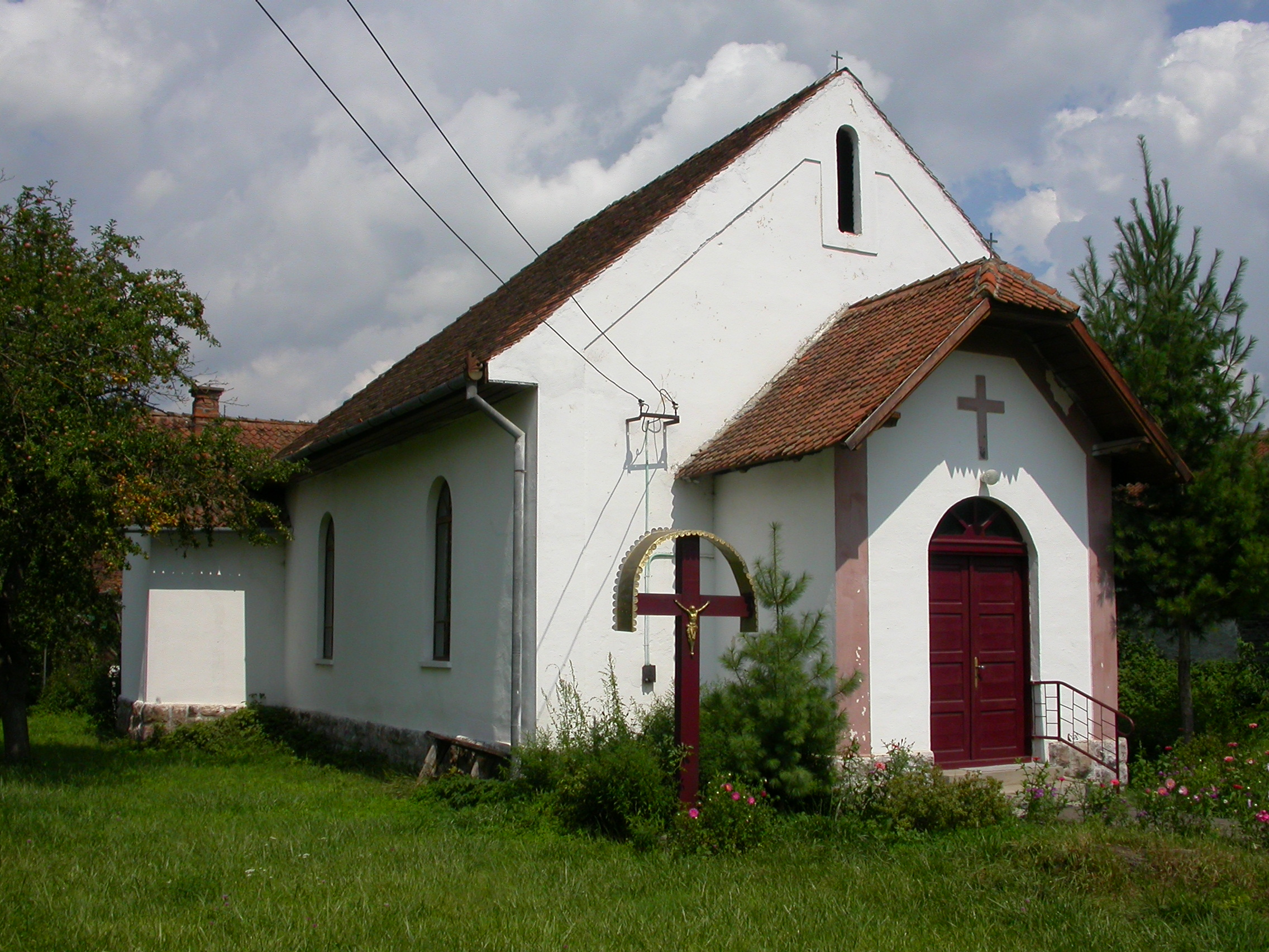 Biserica catolică